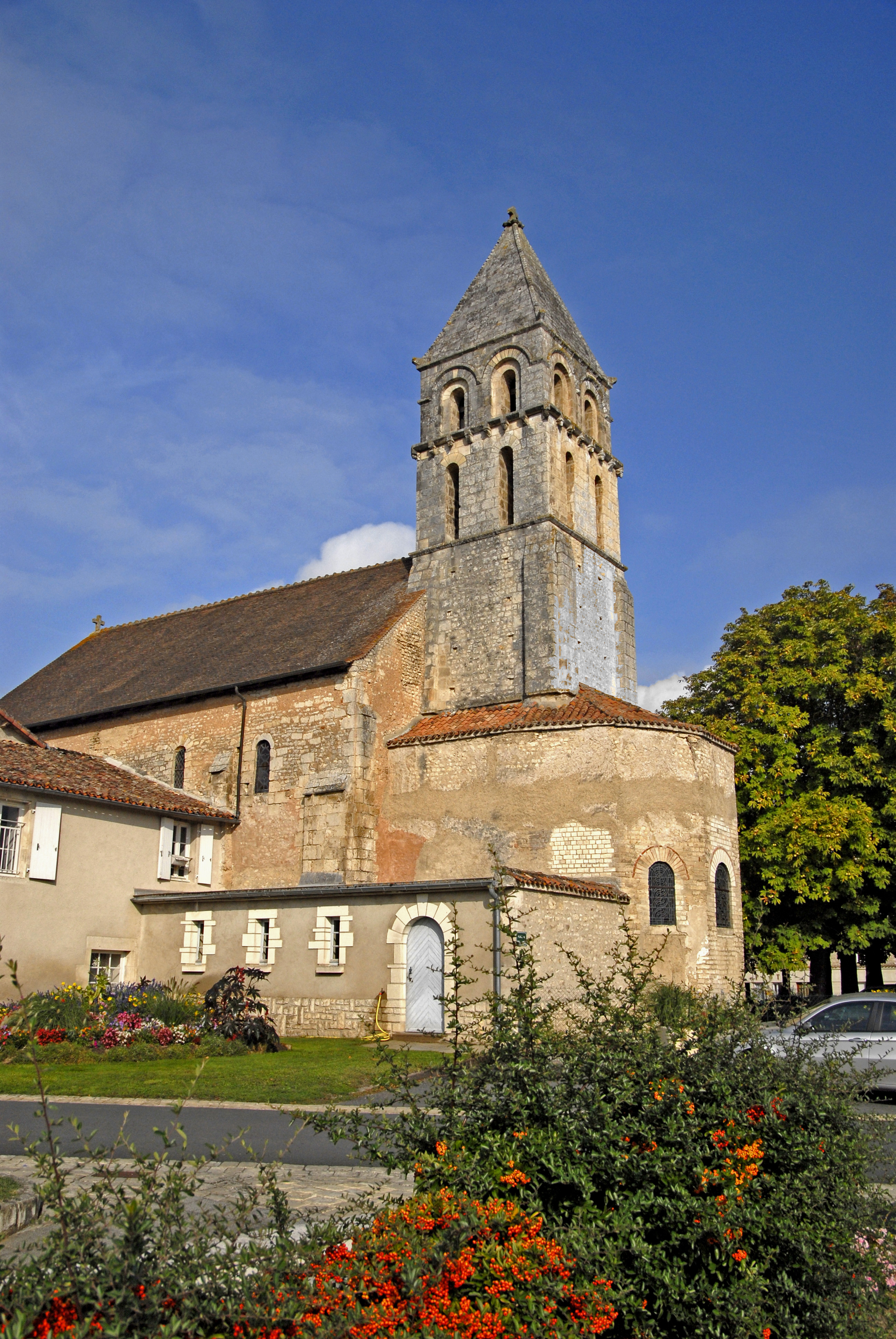 Civaux, Dorfkirche